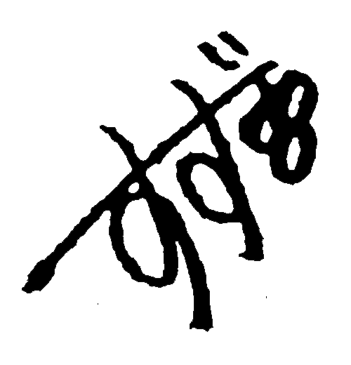 本庄鈴署名